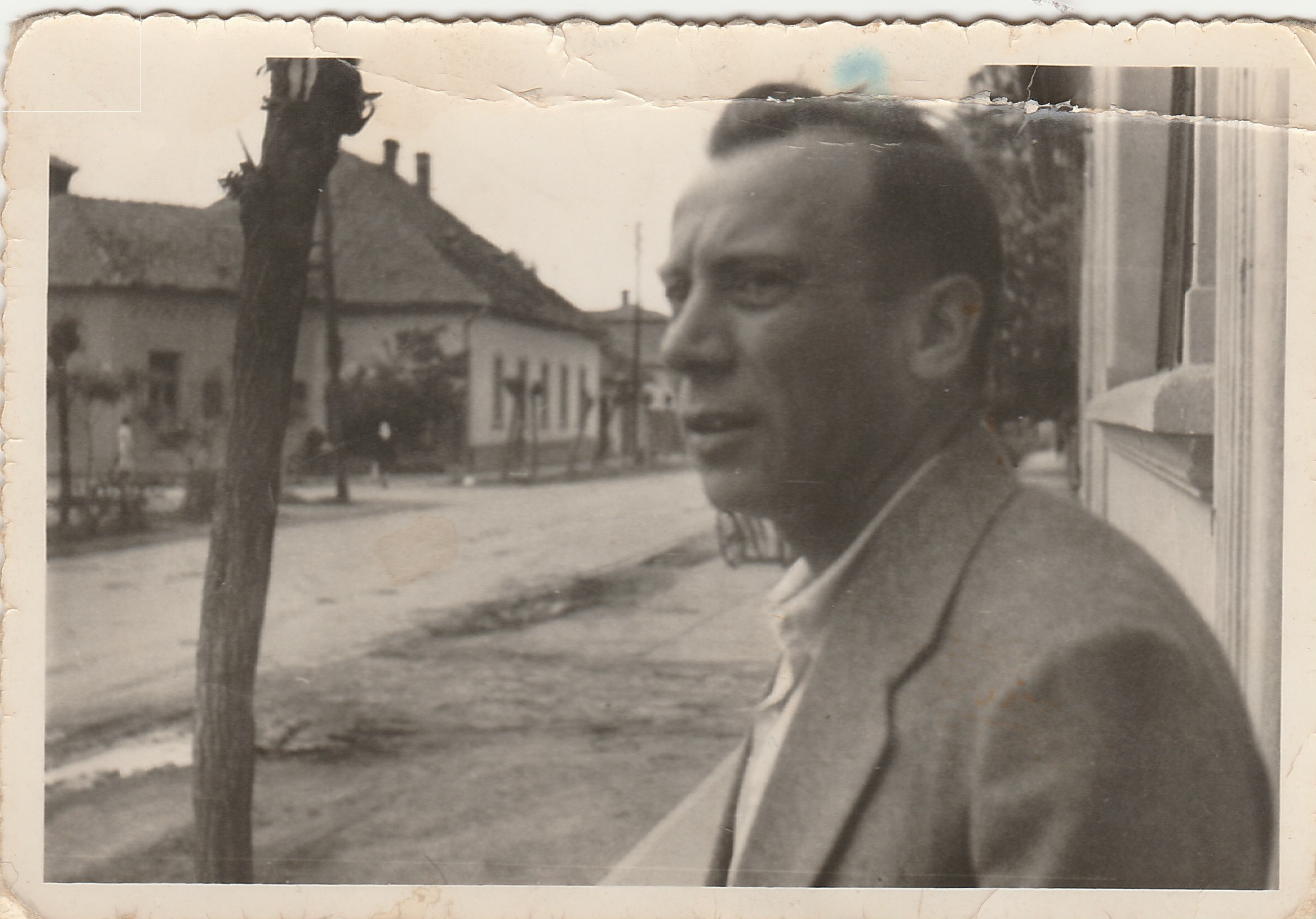 A kép a Földművesszövetkezet irodája előtt készült 1955-ben.